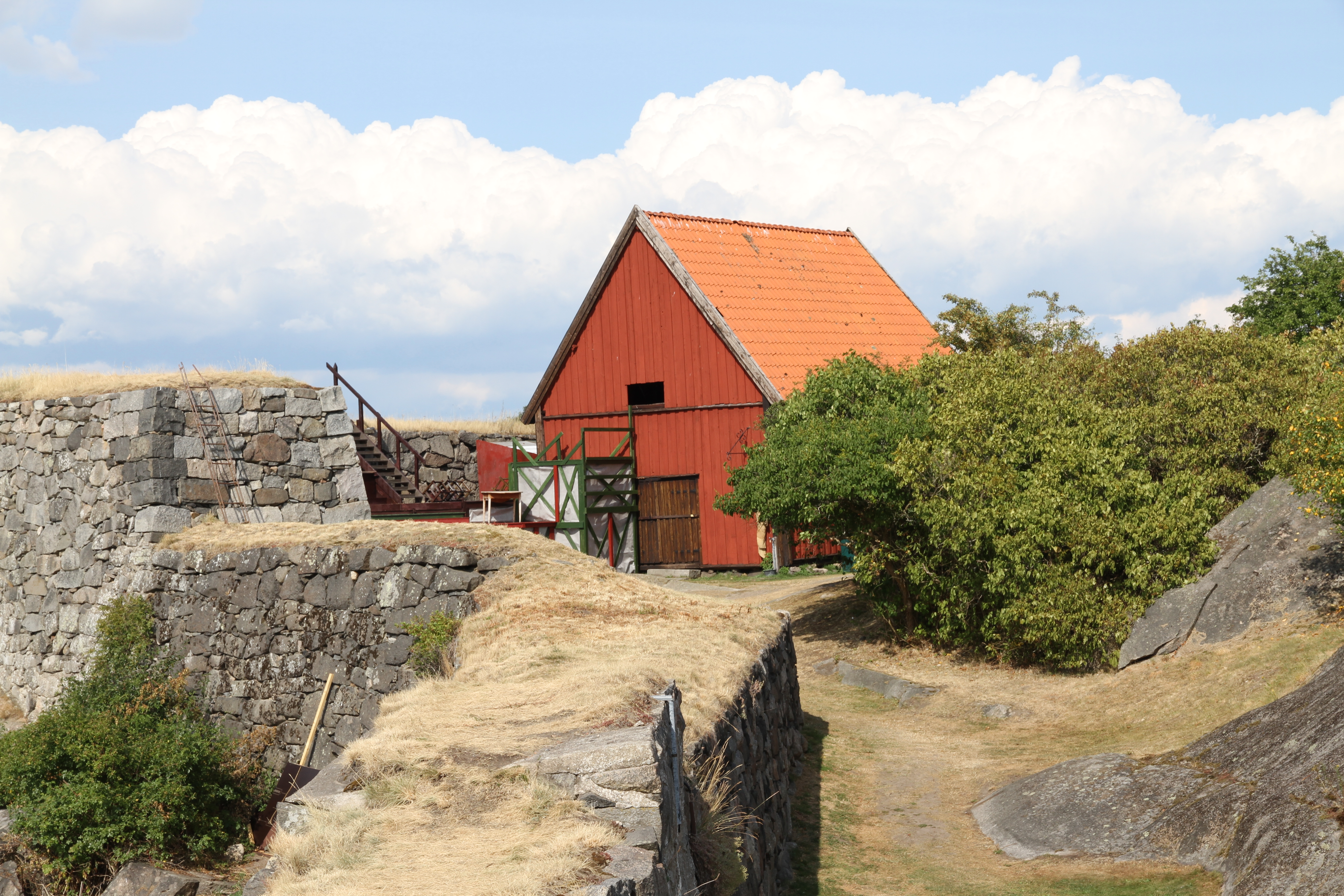 Karlshamns Kastell 26 juli 2013